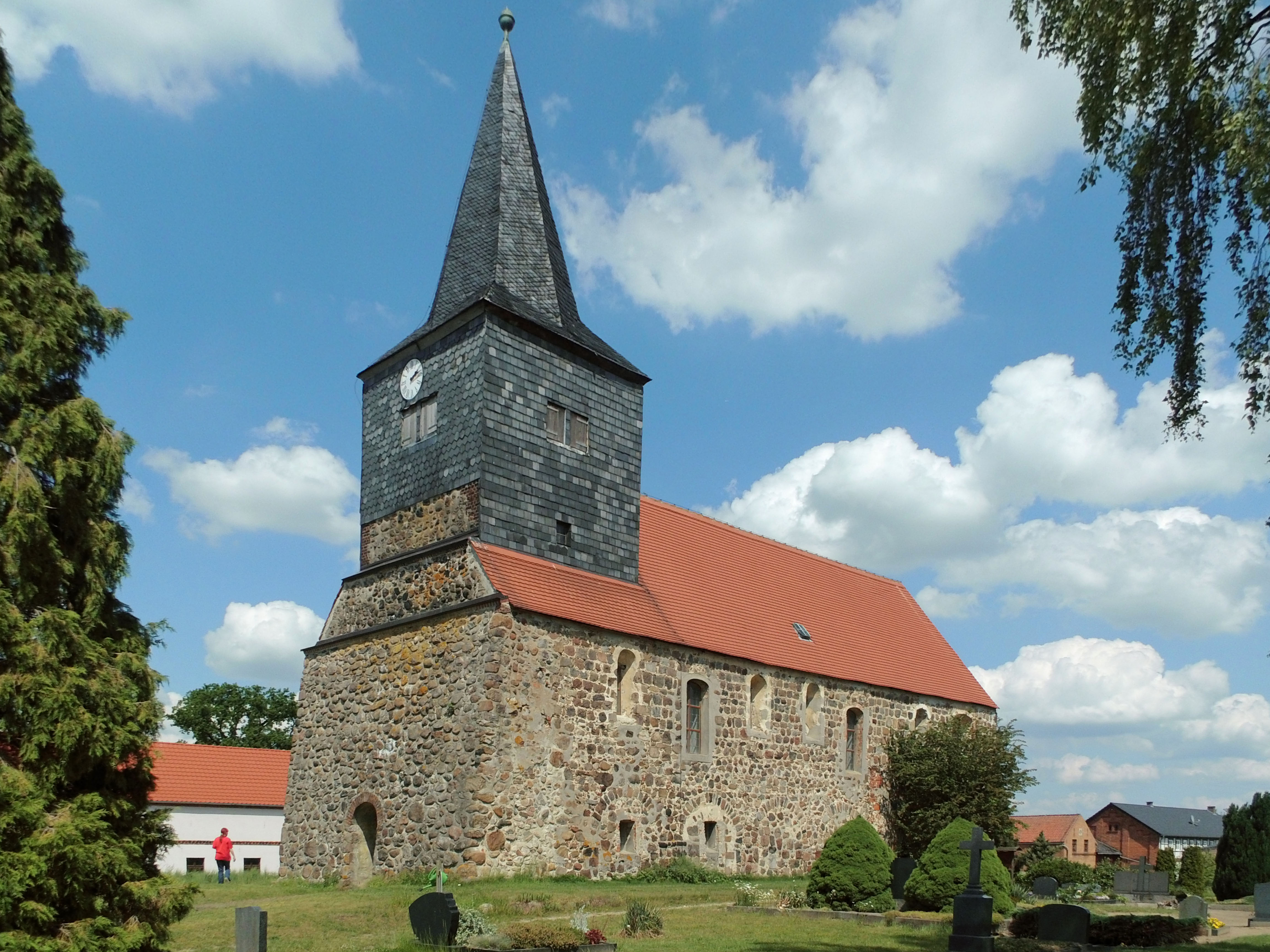 Evangelisch-lutherische Kirche in Jeeben bei Beetzendorf (sachsen-Anhalt).